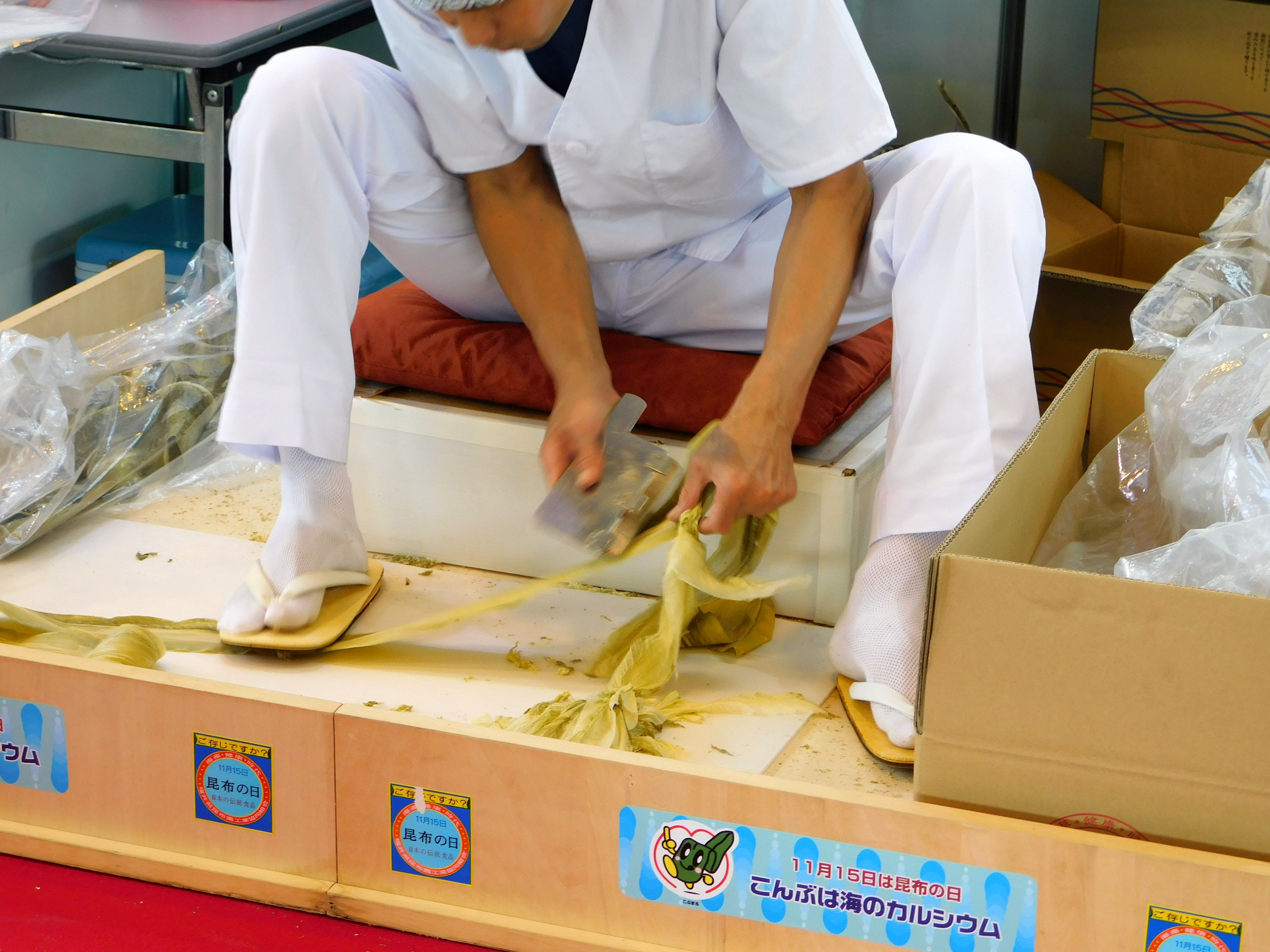 おぼろ昆布の加工、昆布かきの実演、敦賀観光物産フェアにて。